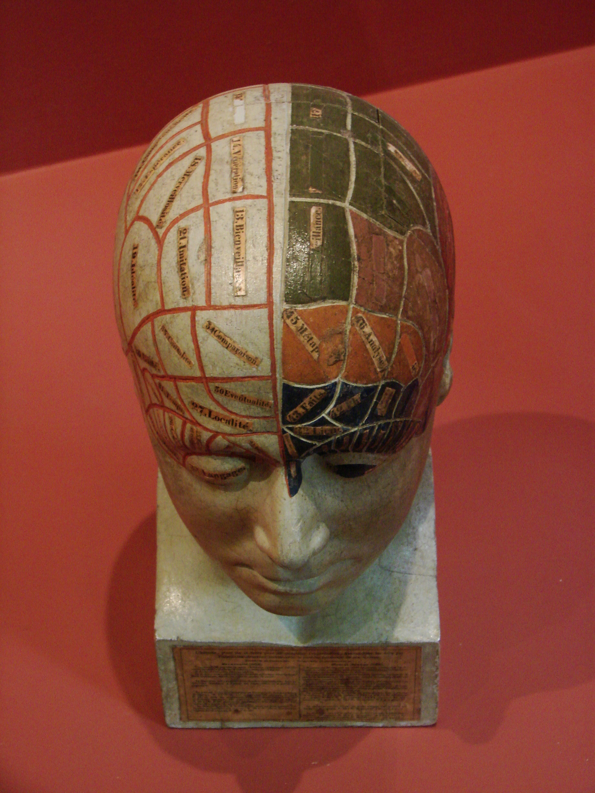 Palais de Rumine, ville de Lausanne (Suisse) : tête phrénologique, XIXe siècle, bois peint, situé dans le hall d'entrée du bâtiment.